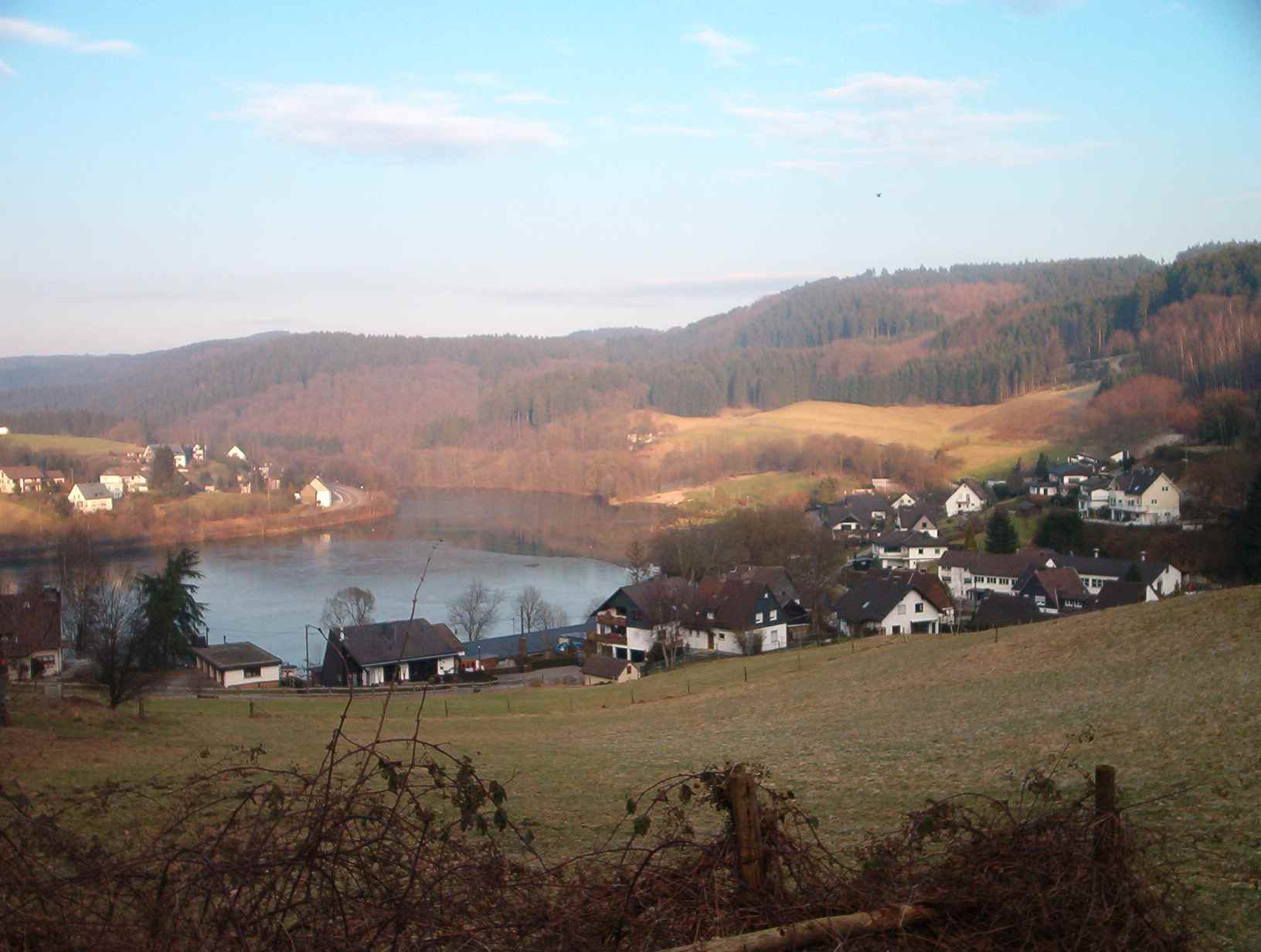 Bruch, Ortsteil von Gummersbach Autor: Stephan Baum